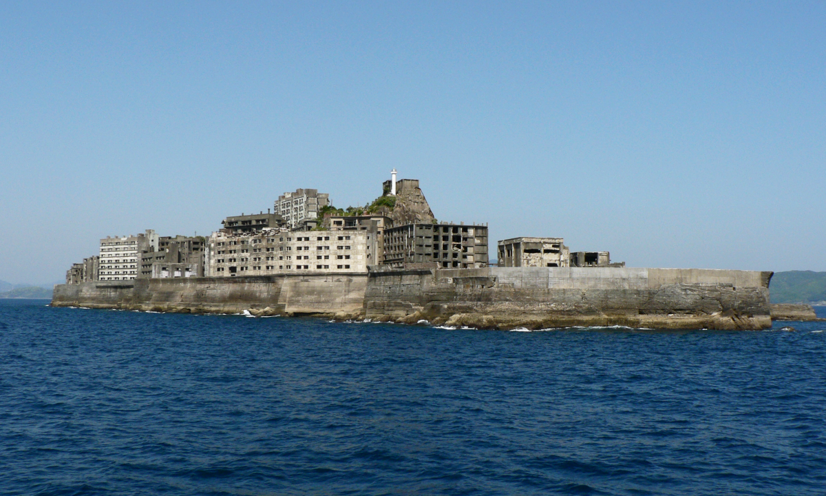 Die verlassene japanische Insel Hashima (auch: Gunkanjima). Von 1887 bis 1974 diente sie zum unterseeischen Kohleabbau